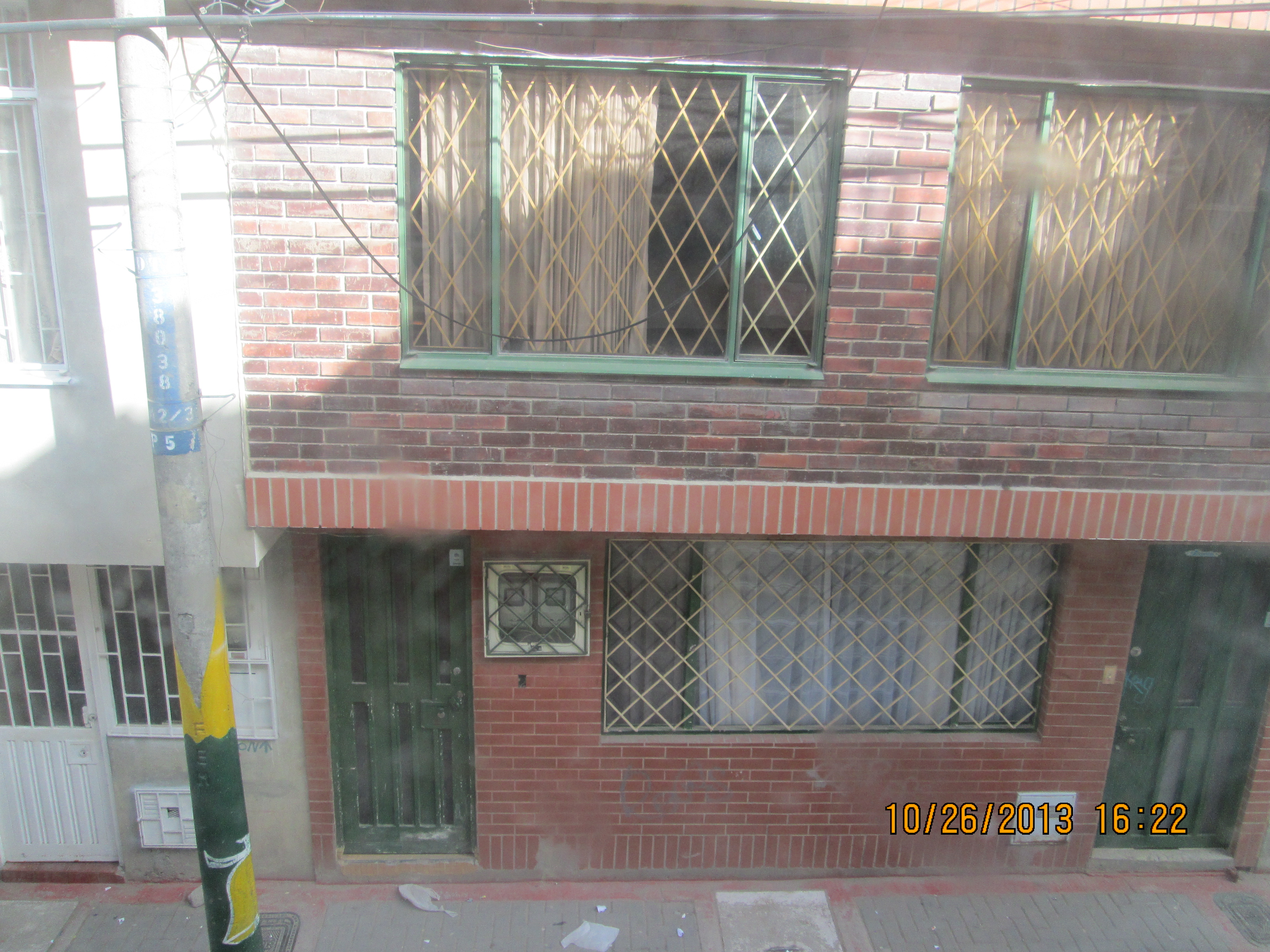 El barrio